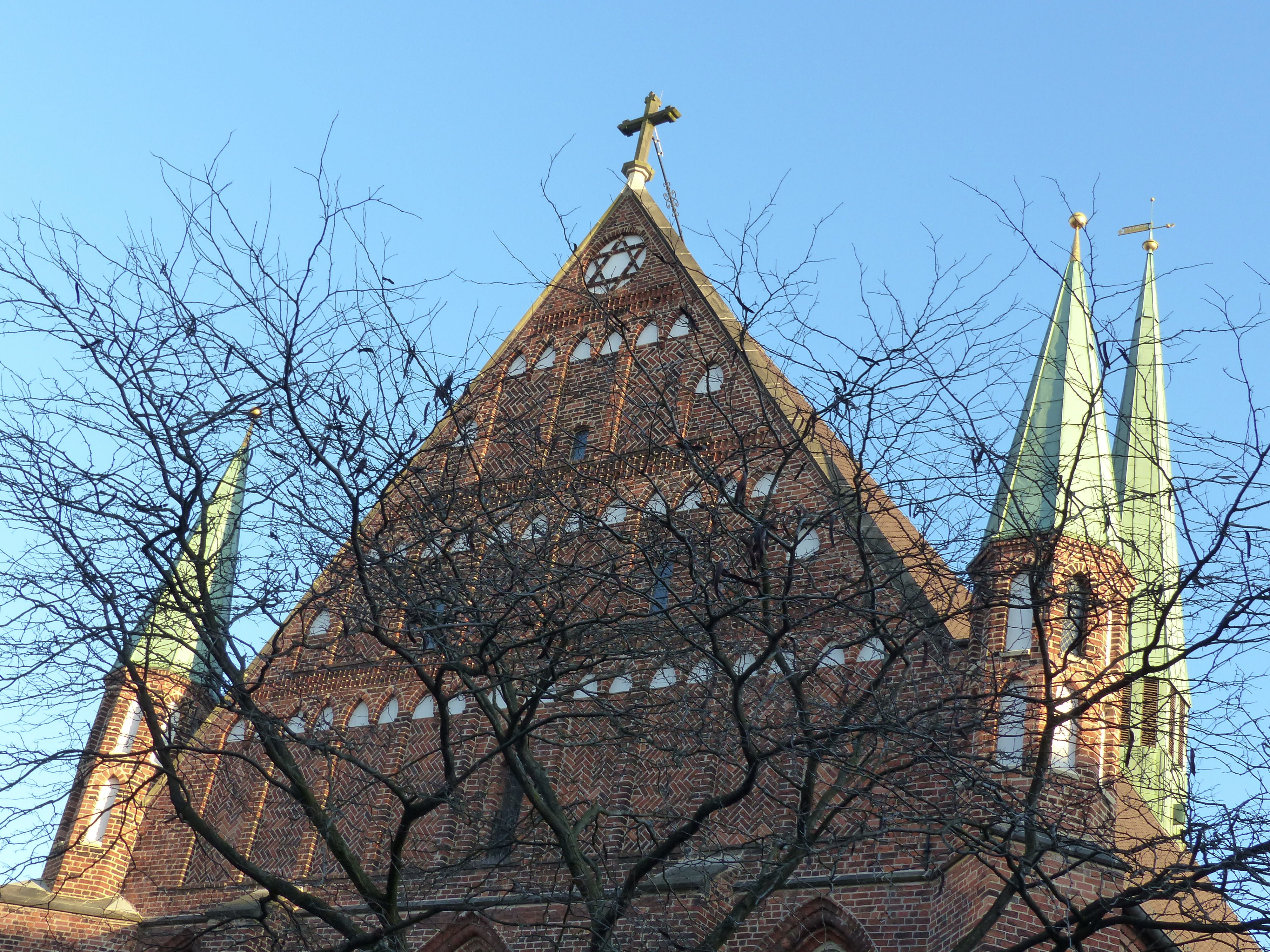 Schmuckgiebel der Probsteikirche St. Johann in der Bremer Altstadt Renovierung und Umbauten 2015/2016